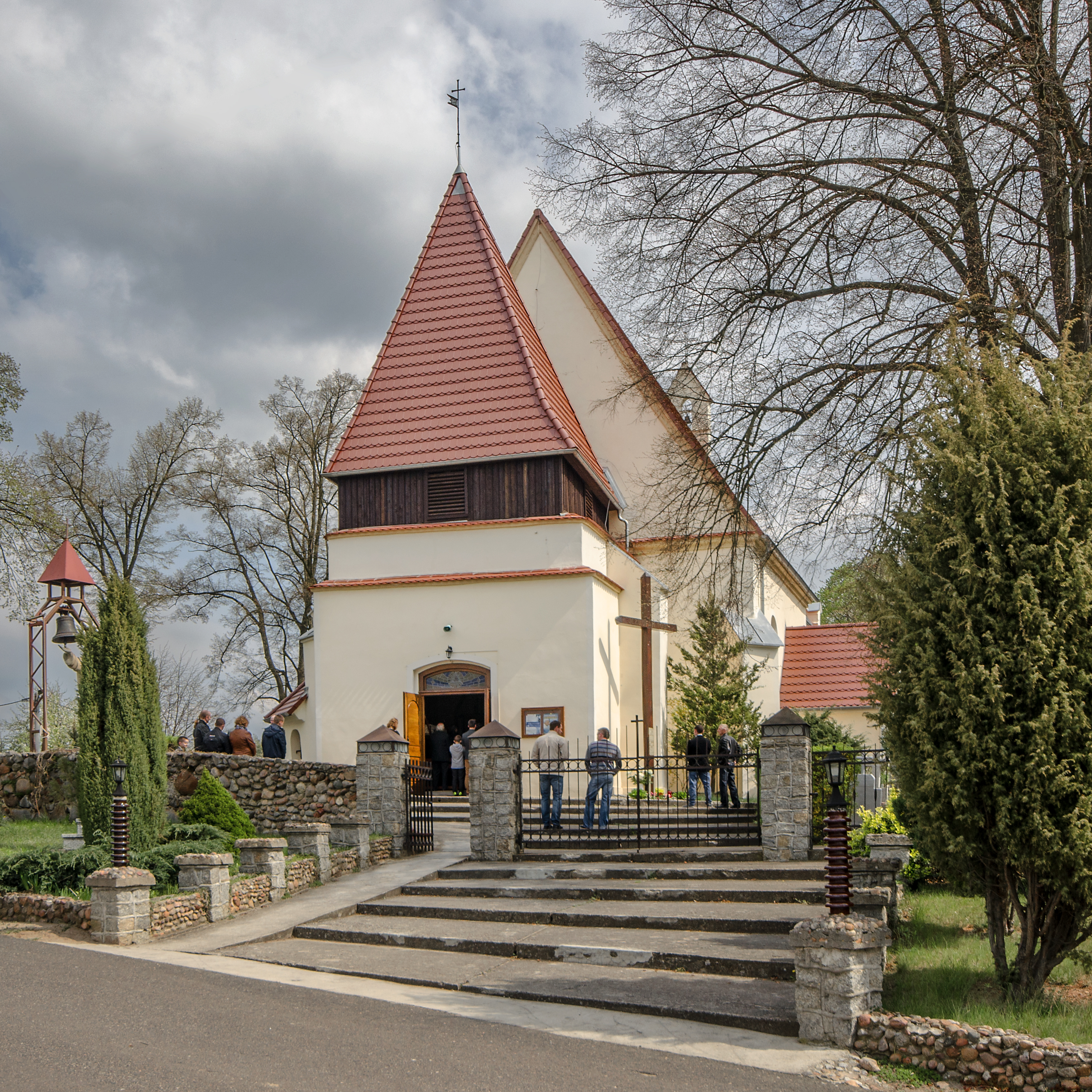 Gwizdanów, kościół par. p.w. św. Urszuli, XIII, 1756, 1871-1872